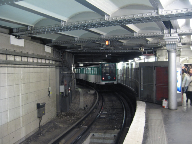 Boucle de Porte d'Orléans, ligne 4 du métro de Paris